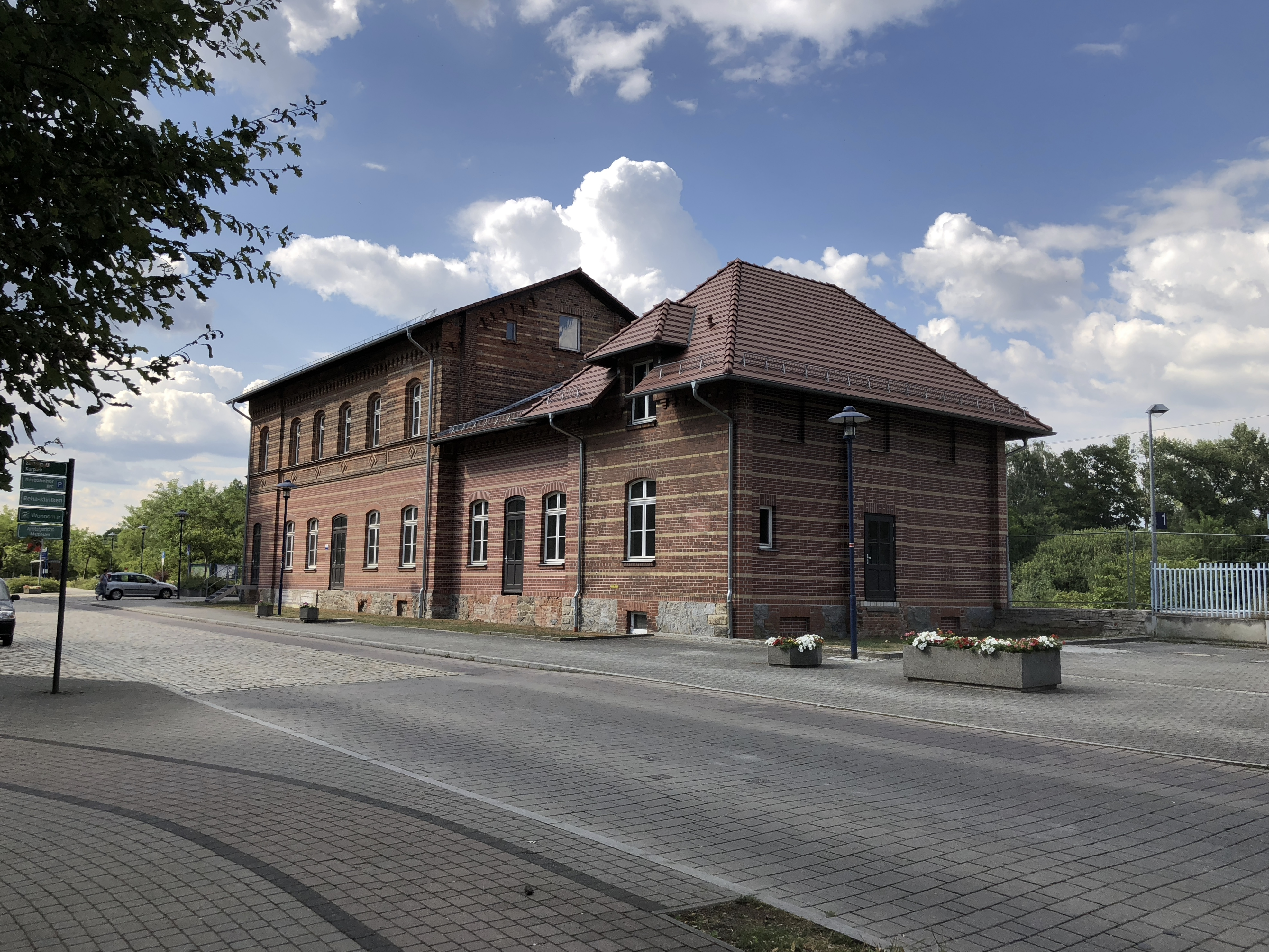 Bahnhof Bad Liebenwerda 2018